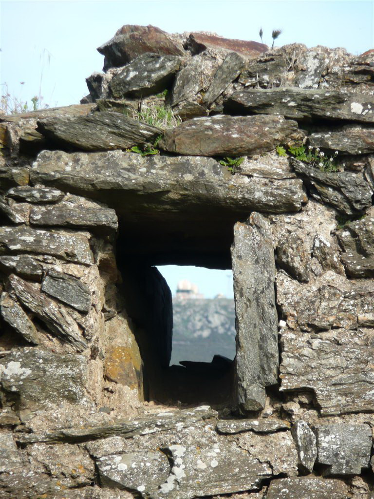 Castell de Bufalaranya (Roses, Alt Empordà). Orifici de guaita sobre el Pení (E).